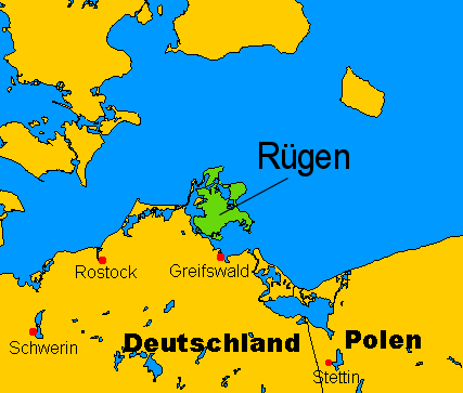 Lagekarte Rügen